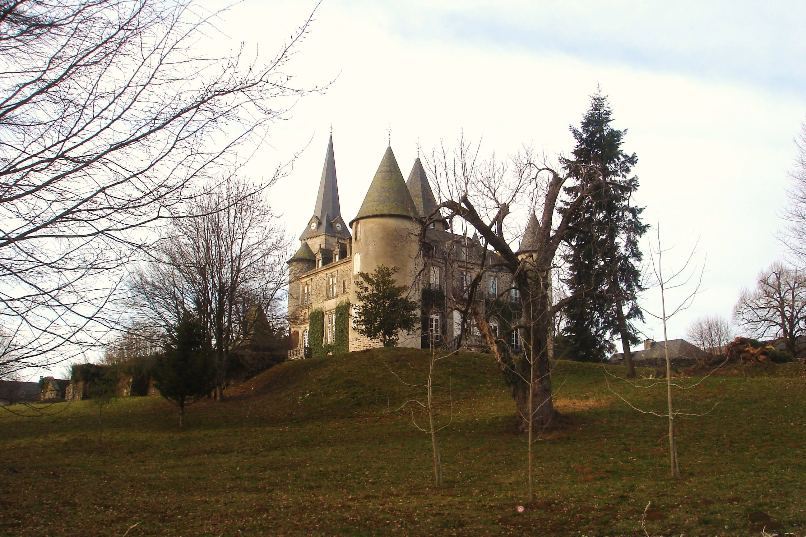 Château de la ville de Seilhac - Corrèze - France